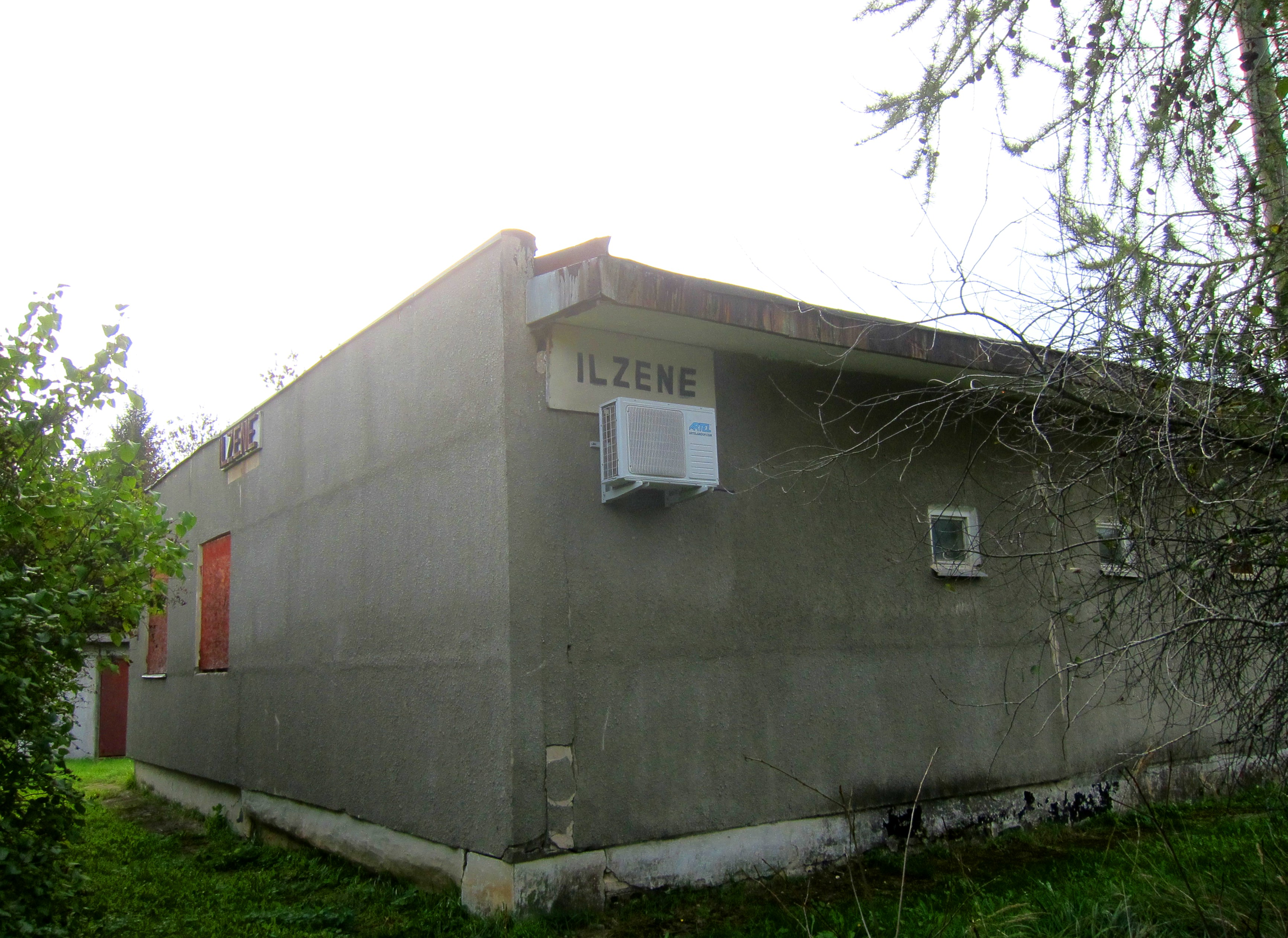 Ilzēnu stacijas ēka